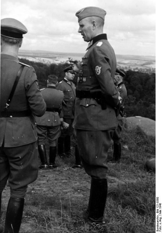 Fahrt durch Burgund l.:Gf. Berkelmann , vorne Mitte: Ob. d. Sch. Winkelmann [Otto?]